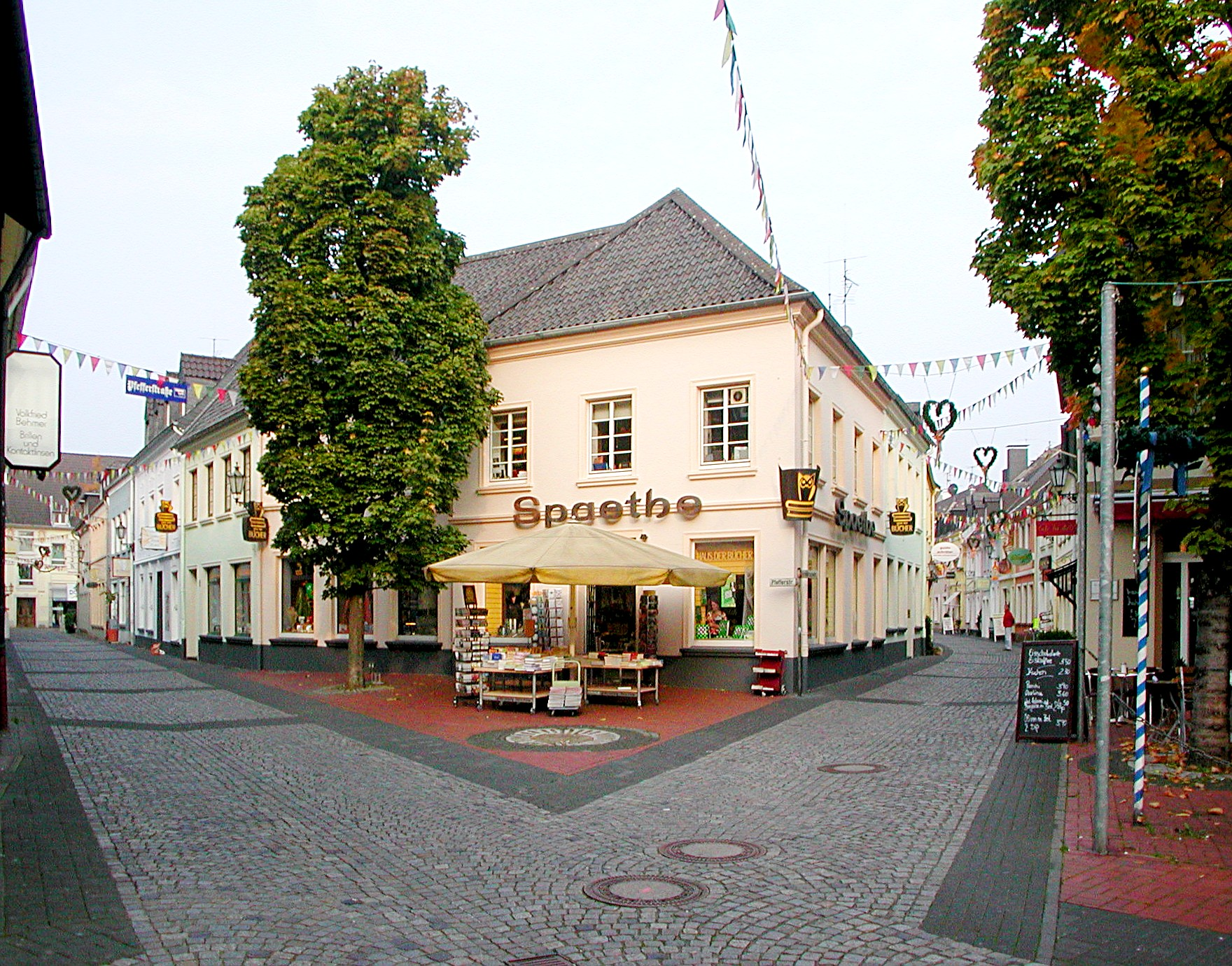 Altstadtgassen in Moers